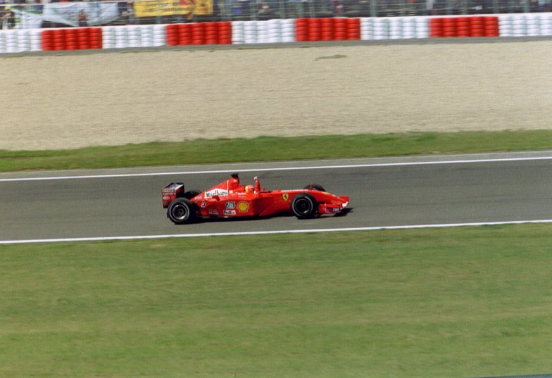 Schumacher European Grand Prix 2001